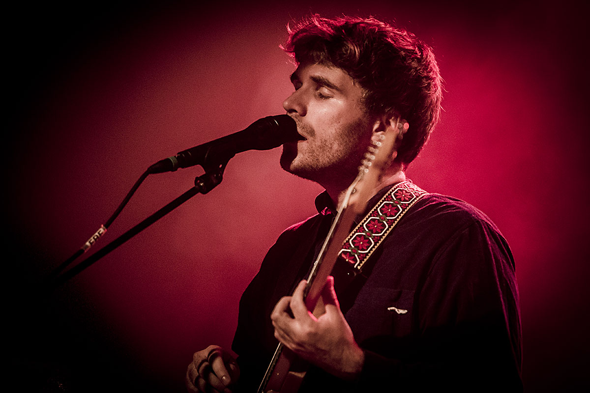 Treefight For Sunlight 11/10-14